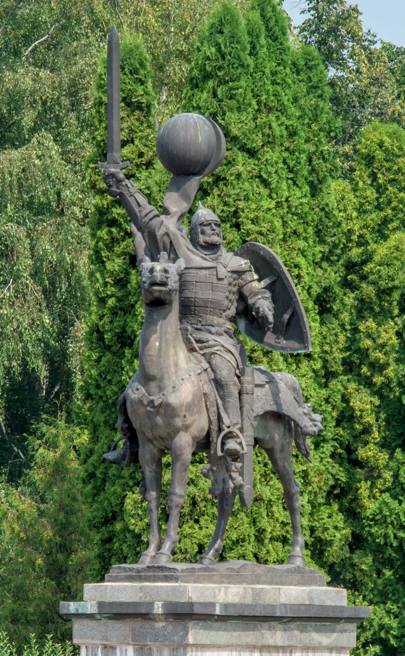 Пам'ятник князю Ігорю, Новгород-Сіверський, площа ім. Леніна